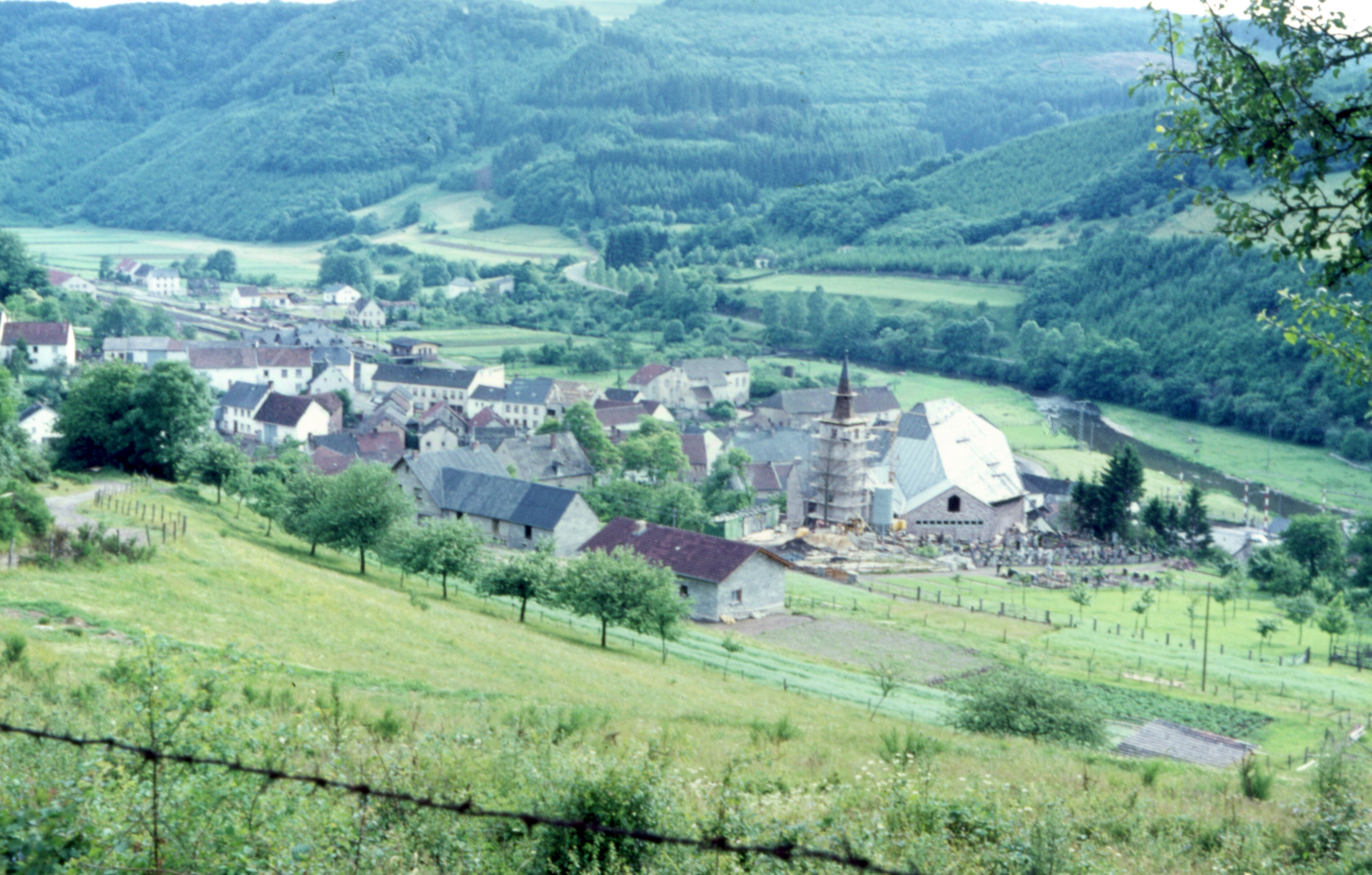 Densborn, wahrscheinlich 70er Jahre. Gescanntes Dia